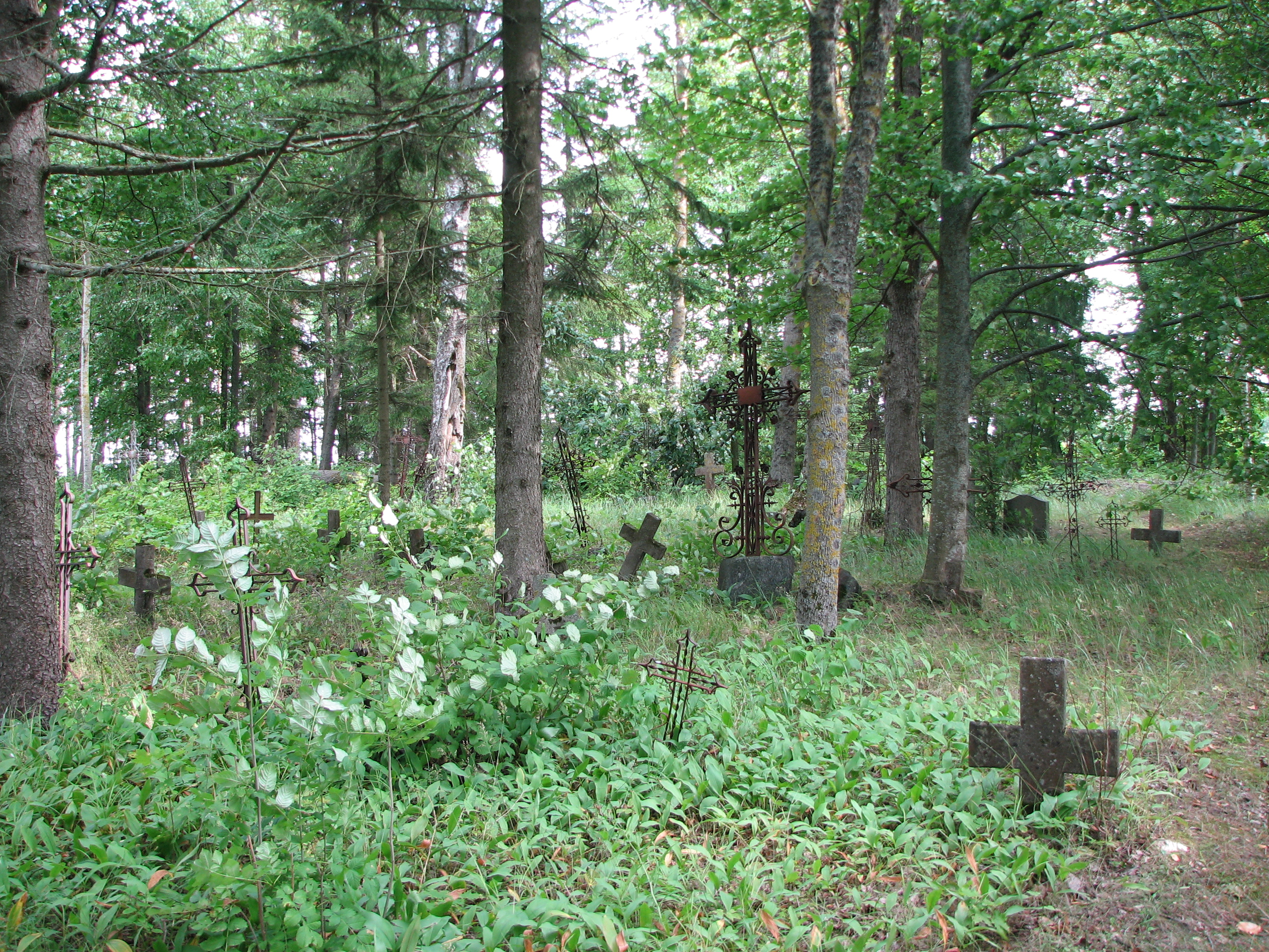 Hosby vana kalmistu Noarootsi vallas